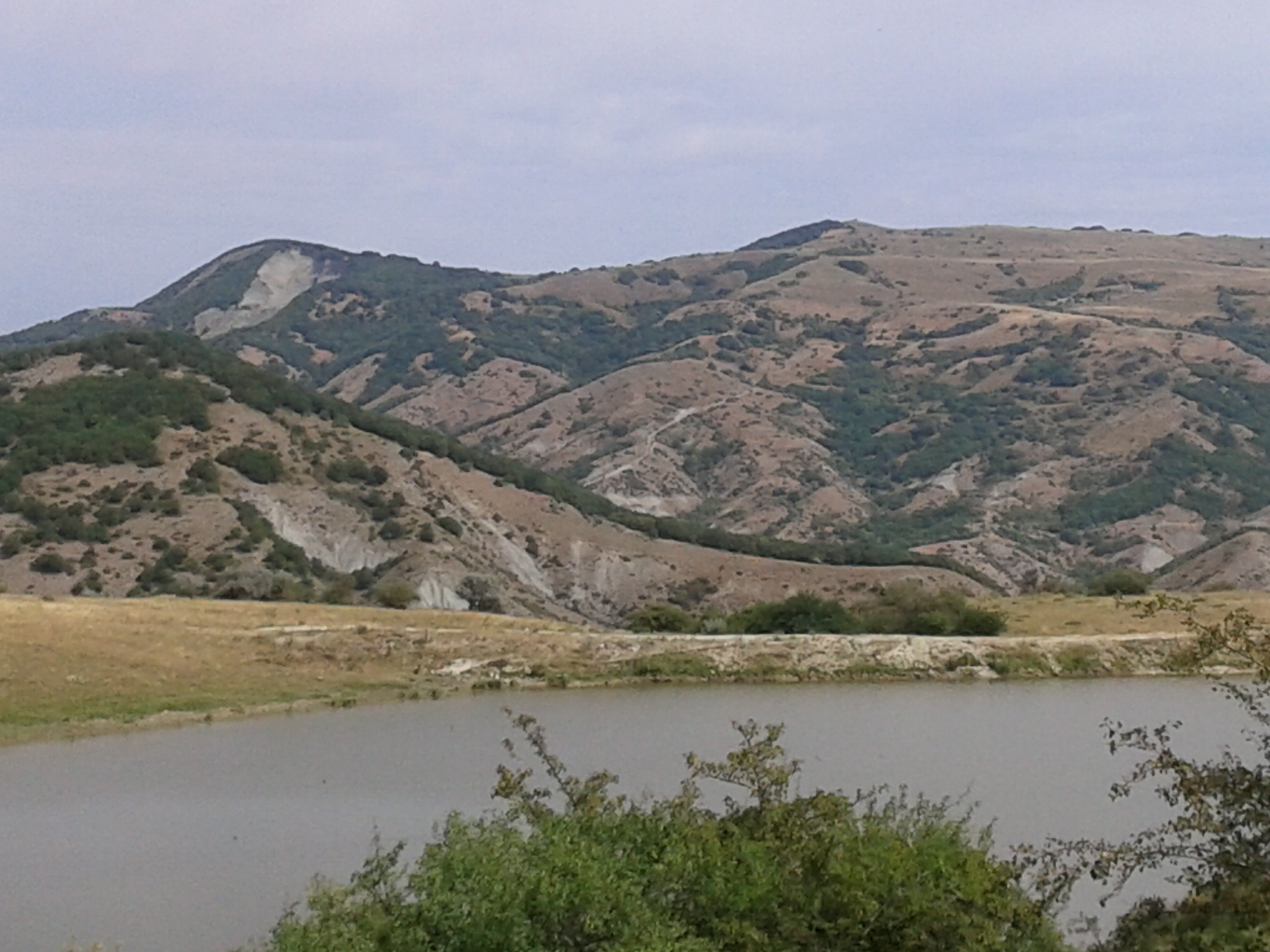 Çılpaqdağ terrası